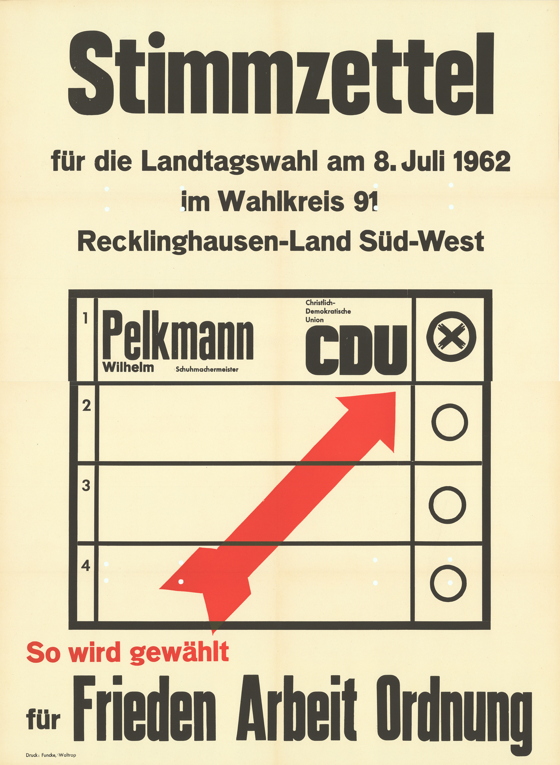 Stimmzettel für die Landtagswahl ... im Wahlkreis Recklinghausen-Land Süd-West 1 Pelkmann CDU Wilhelm Schumachermeister So wird gewählt für Frieden Arbeit Ordnung Abbildung: Stimmzettel Plakatart: Kandidaten-/Personenplakat ohne Porträt Drucker_Druckart_Druckort: Funcke, Waltrop Objekt-Signatur: 10-009 : 469 Bestand: Landtagswahlplakate Nordrhein-Westfalen (10-009) GliederungBestand10-18: Landtagswahlplakate Nordrhein-Westfalen (10-009) » CDU Lizenz: KAS/ACDP 10-009 : 469 CC-BY-SA 3.0 DE